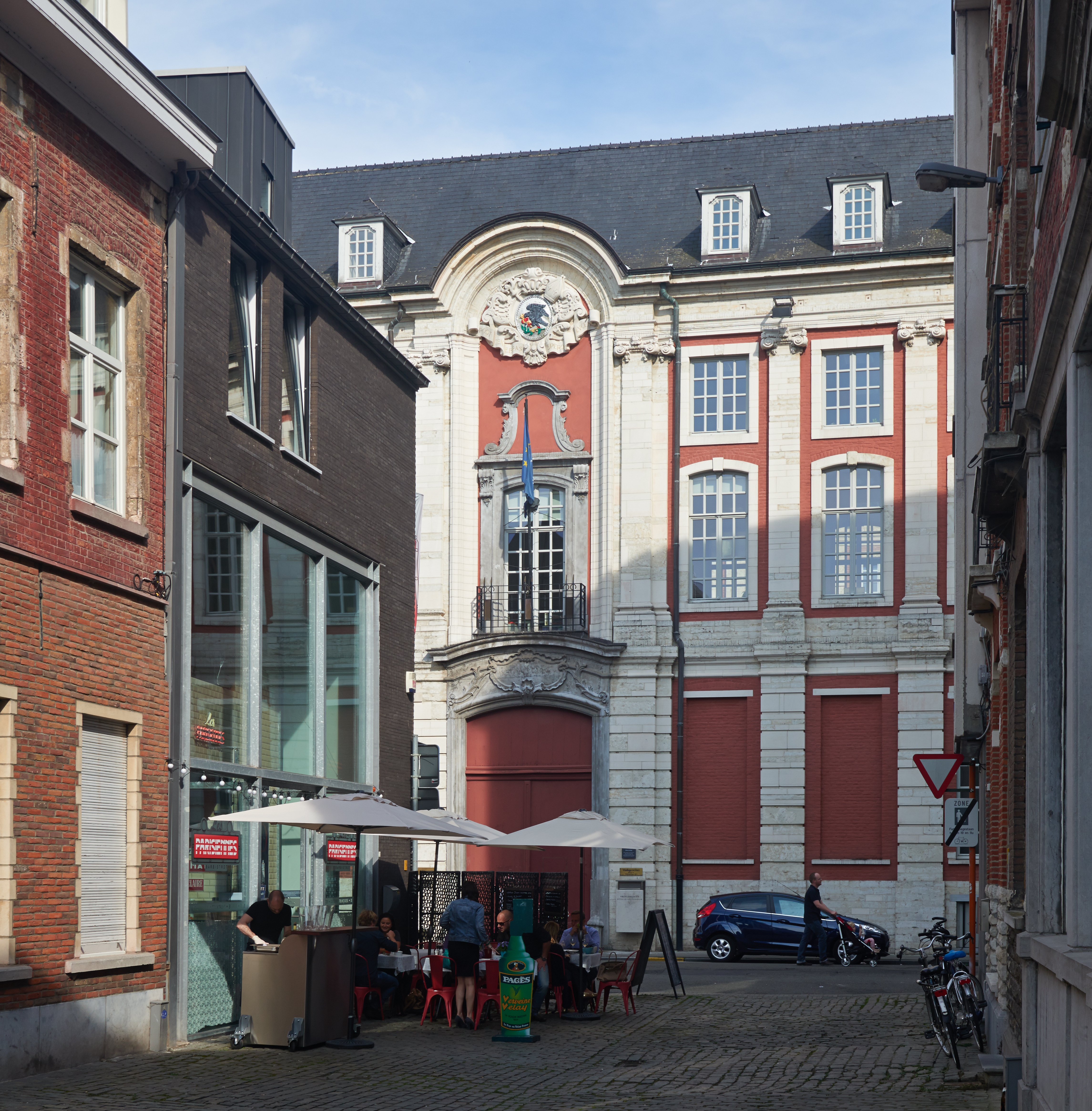 Leuven, Vaartstraat 24-26, zicht op Villerscollege gezien vanuit de Schrijnmakersstraat